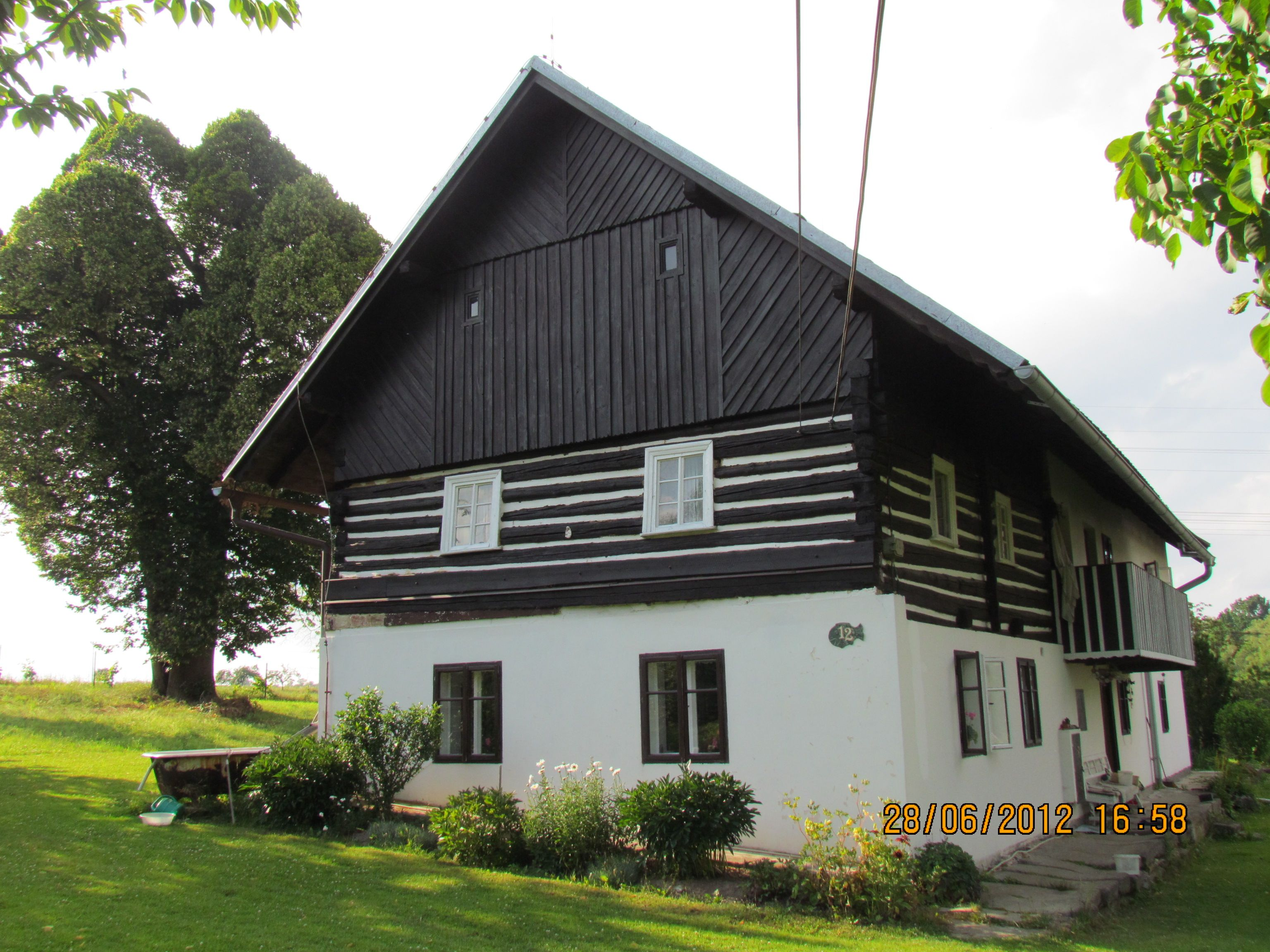 Dům č. 12 pojizerského typu v obci Soběslavice s významnou lípou